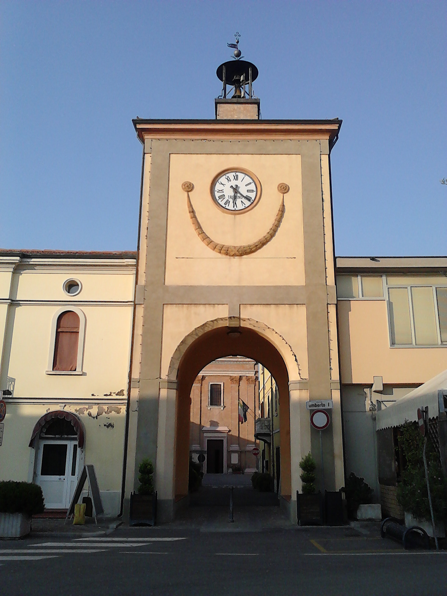 Torre dell'orologio di Sant'Agata sul Santerno